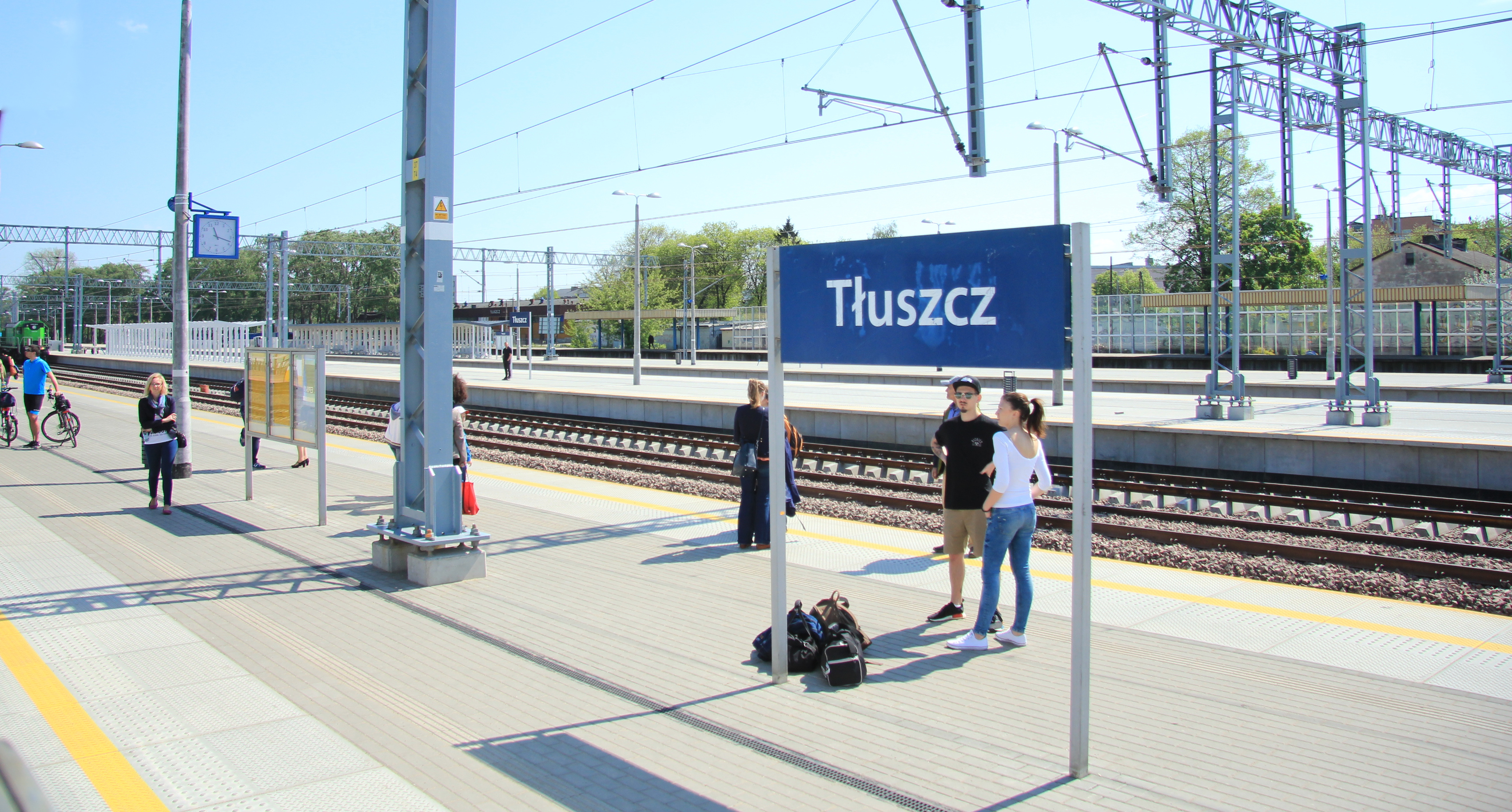 Tłuszcz stacja kolejowa - woj. mazowieckie